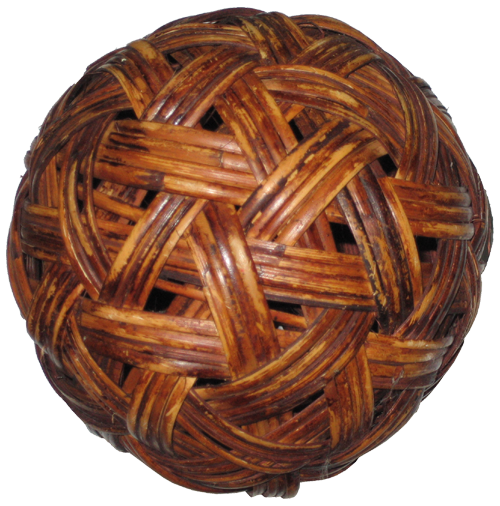 A rattan sepak takraw ball.